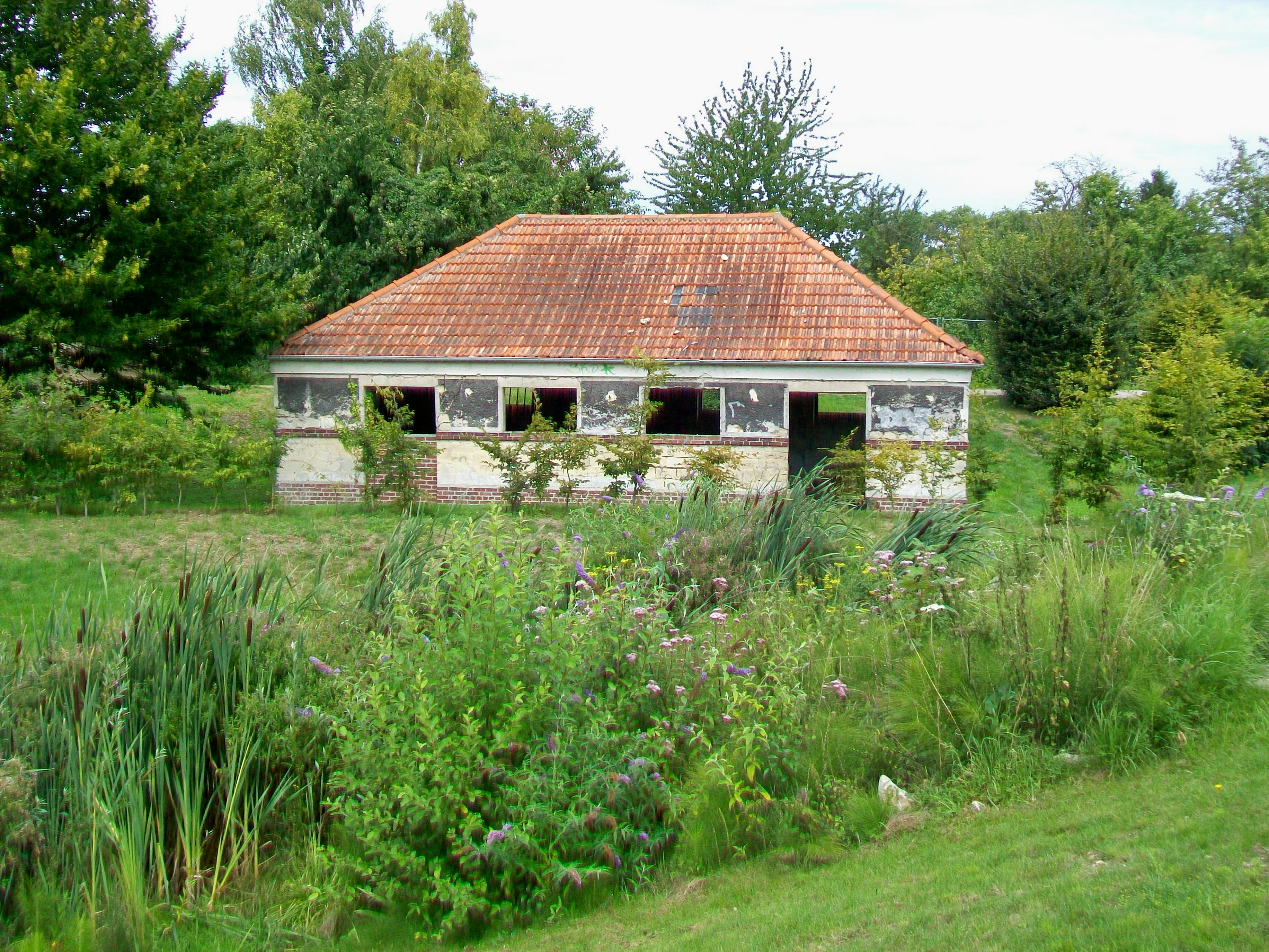 Le lavoir, à la sortie du village en direction de Presles, rue du Croissant. Un ruisseau s'écoule de la source alimentant le lavoir, permettant aux plantes des milieux humides de s'y installer.